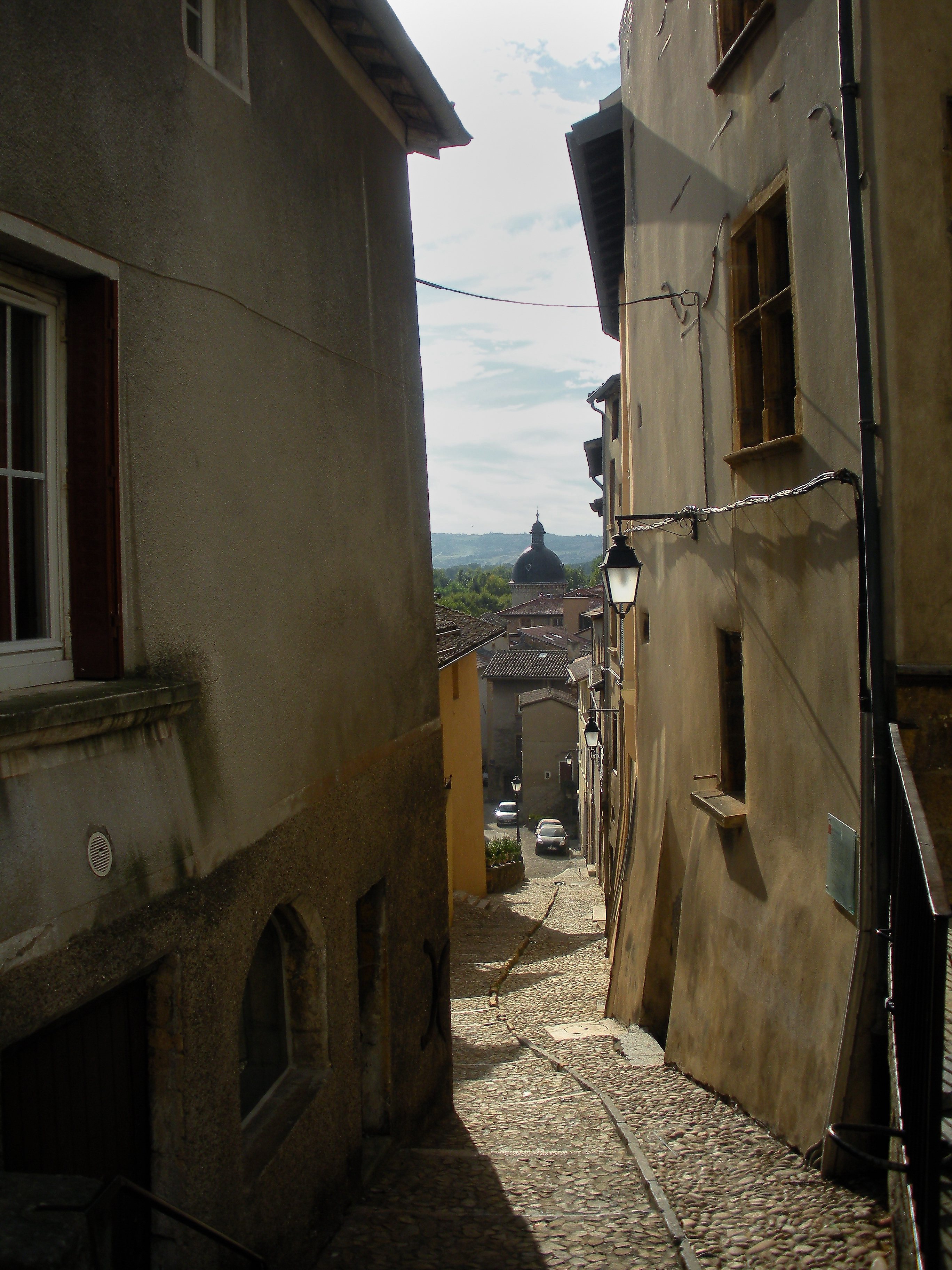 ruelles de Trévoux, rue Cassecou - pavage du côté droit en galets arrondis dit "en tête-de-chat"